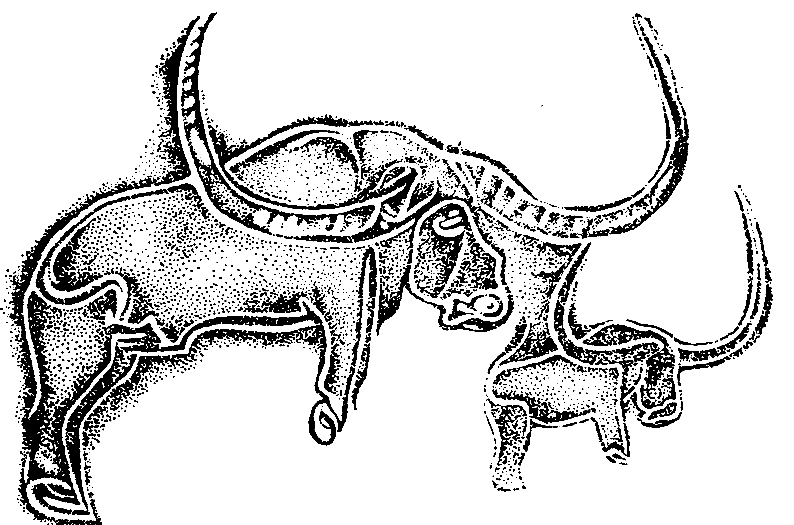 Representación grabada de Búbalus antiquus en el Sáhara